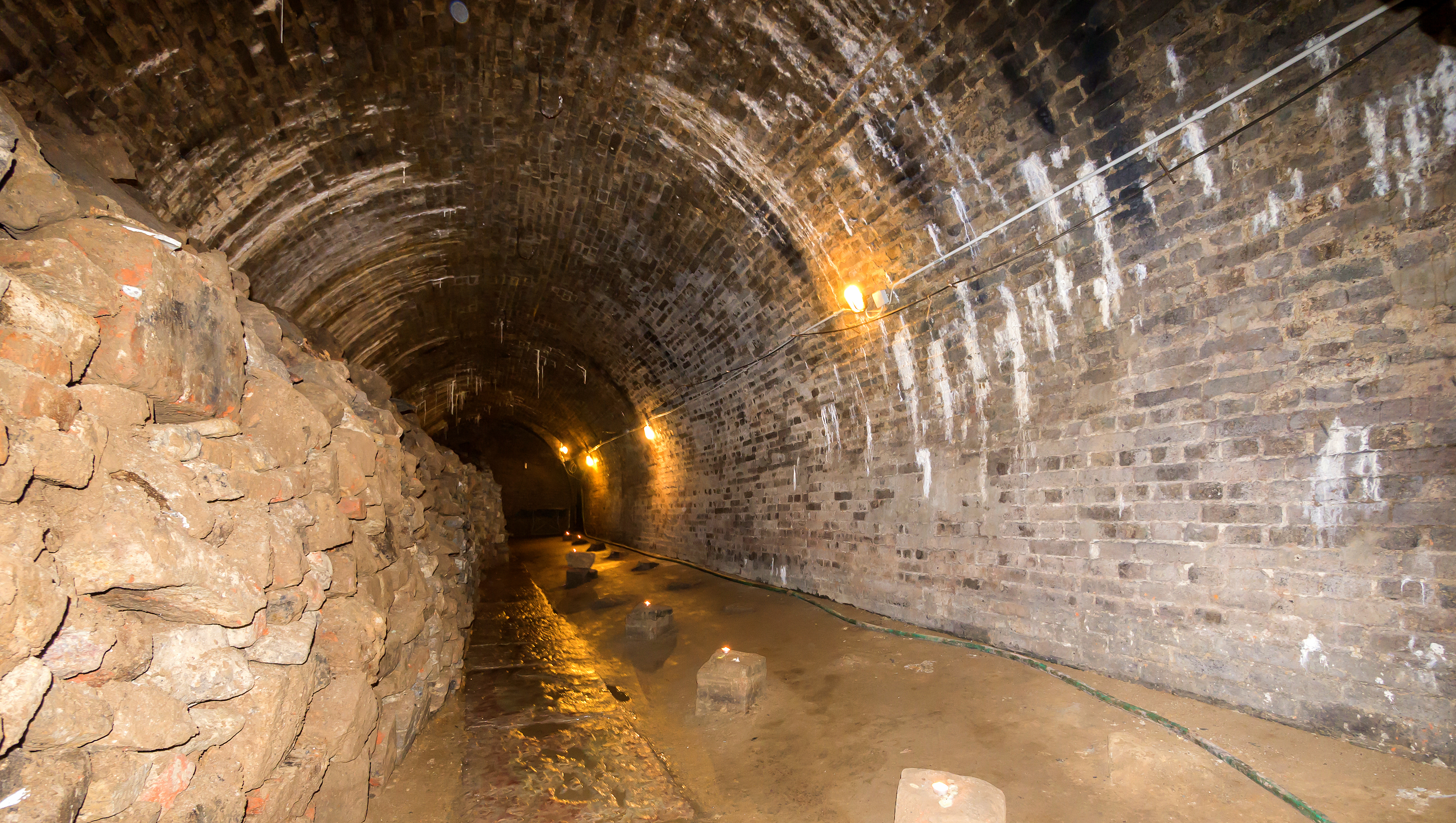 Saalfeld-Saale Blankenburger Straße 5-7 Katakomben unter Wohn- und Geschäftshaus (Neubau) Bestandteil Denkmalensemble "Stadtkern Saalfeld-Saale" 4